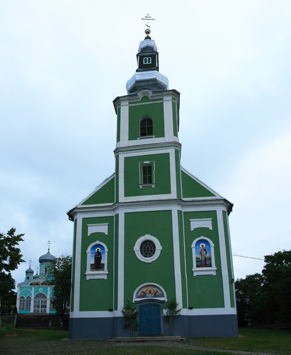 Николаевская церковь в Мукачевском женском монастыре